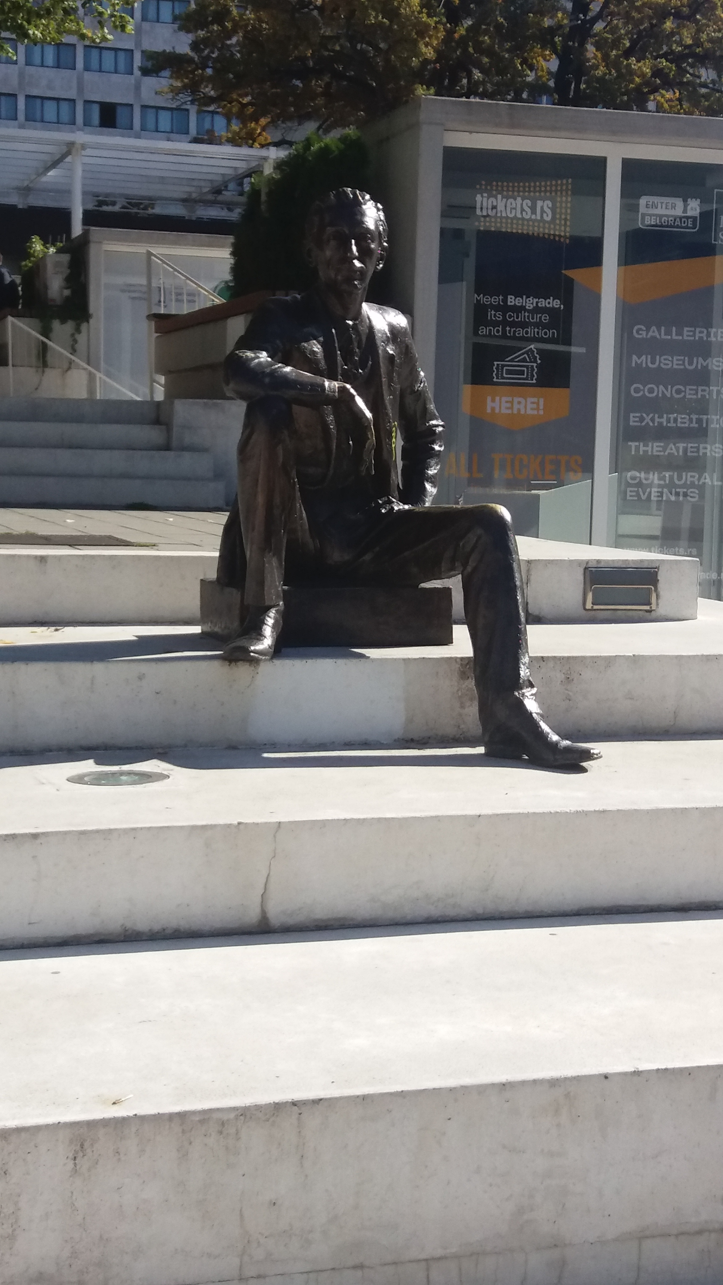 Spomenik Borislavu Pekiću u Beogradu